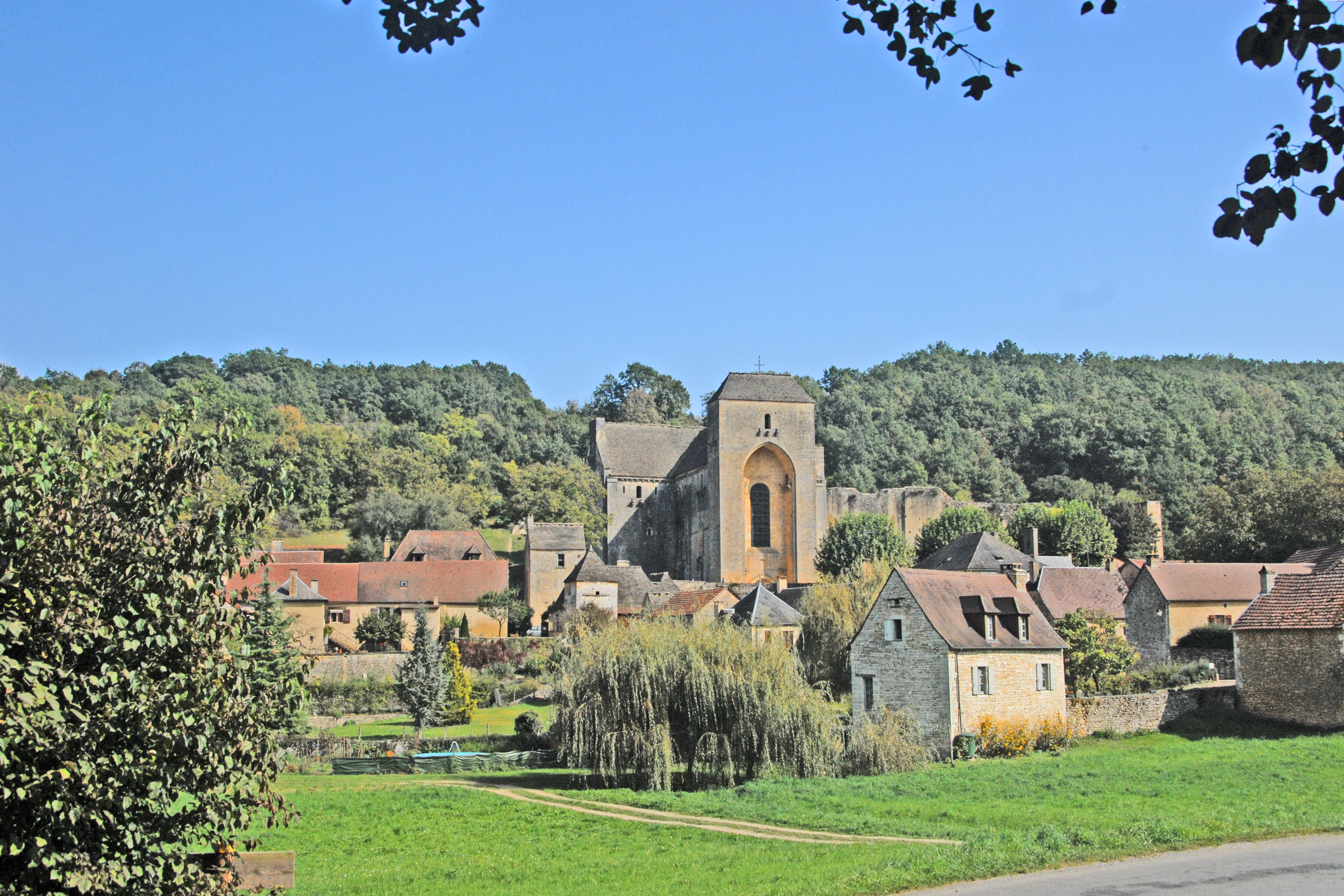 St-Amand-de.Coly. Übersicht von NW